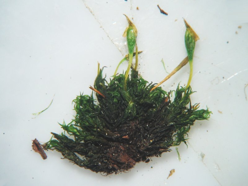 Bruchs Krausblattmoos Ulota bruchii, Müritz-Gebiet